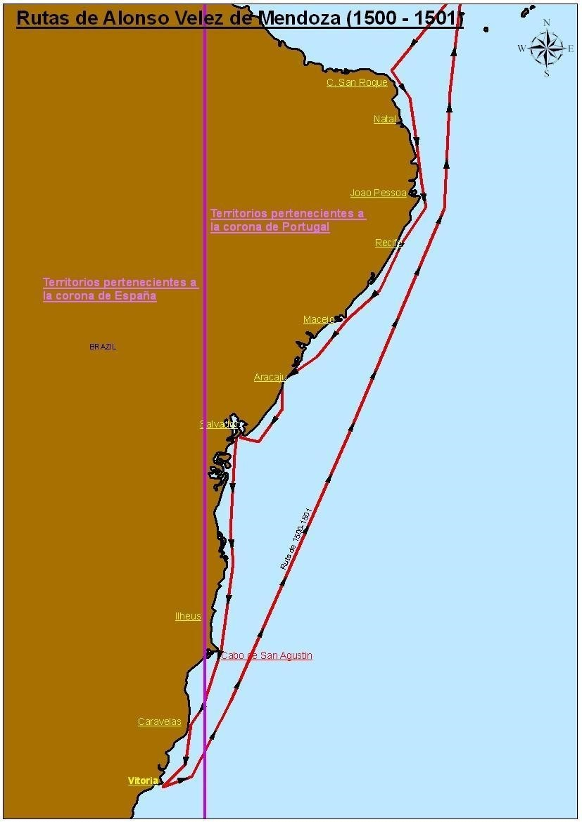 Plano de rutas de exploración de Alonso Vélez de Mendoza.